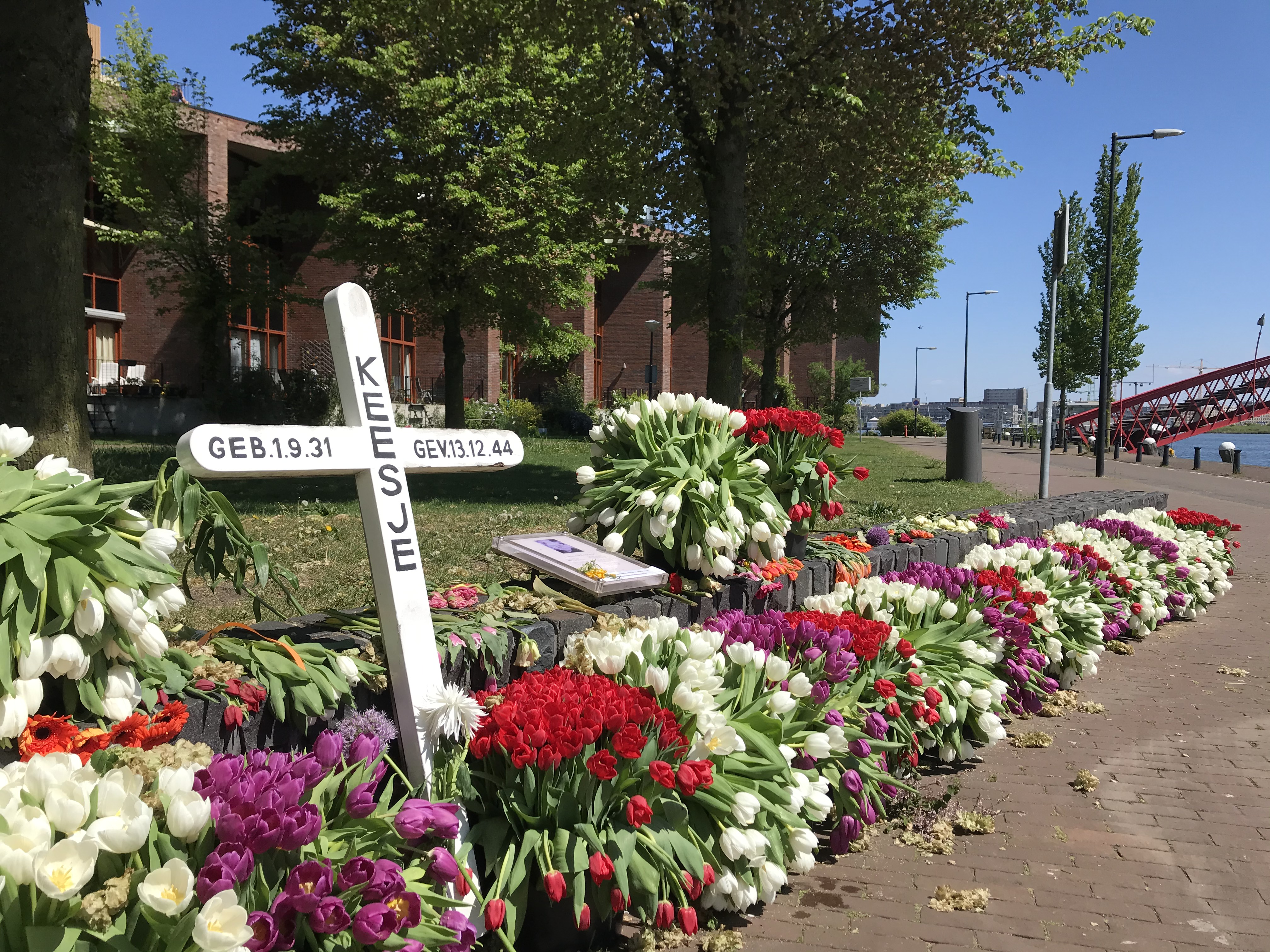 Bloemen bij het kruisje ter nagedachtenis aan Keesje Brijde in het Keesje Brijdeplantsoen Amsterdam ter gelegenheid van Dodenherdenking 2020